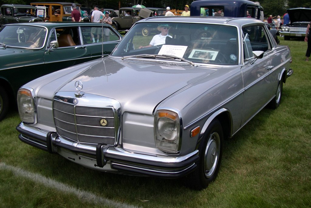 1972 Mercedes-Benz 250C